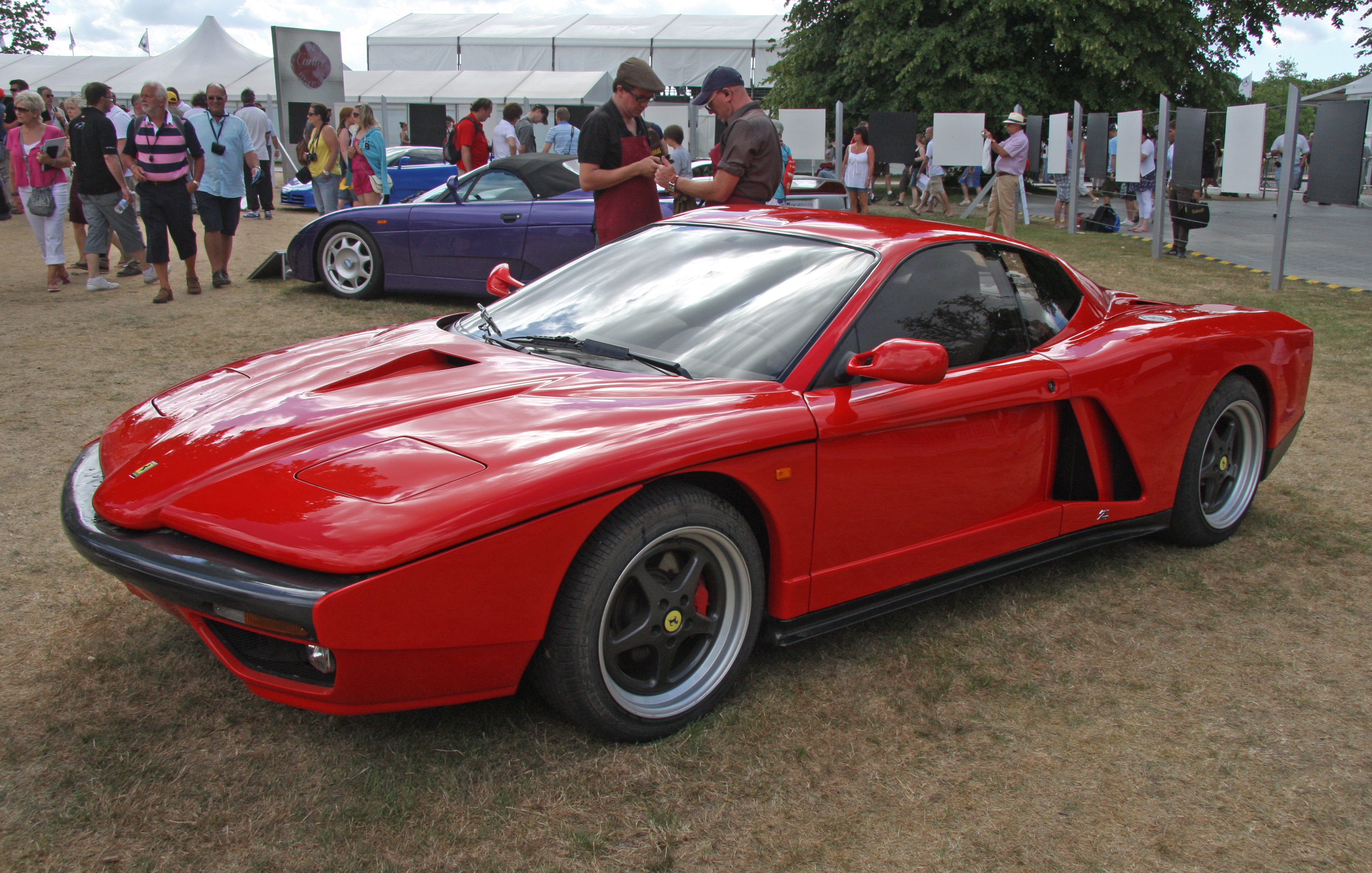 1993 Ferrari F.Z.93 Zagato